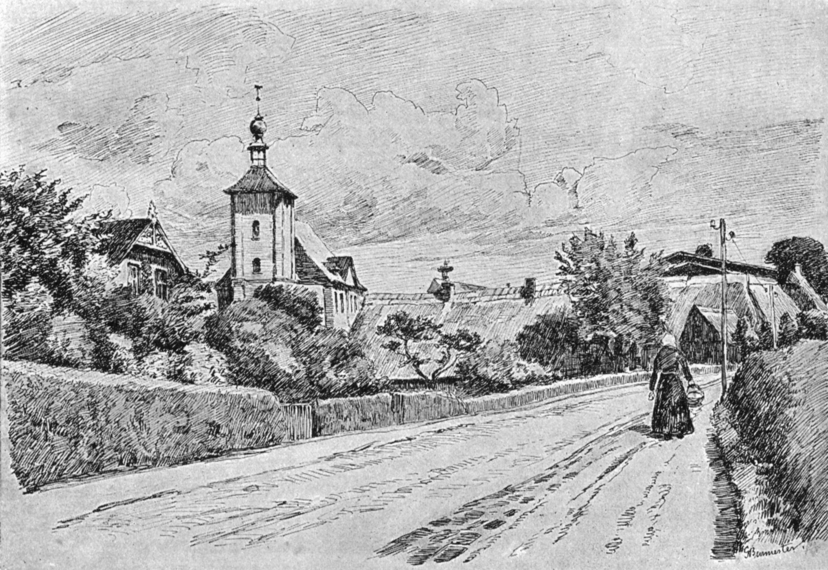 Schönberg um 1895, gezeichnet von Georg Burmester.